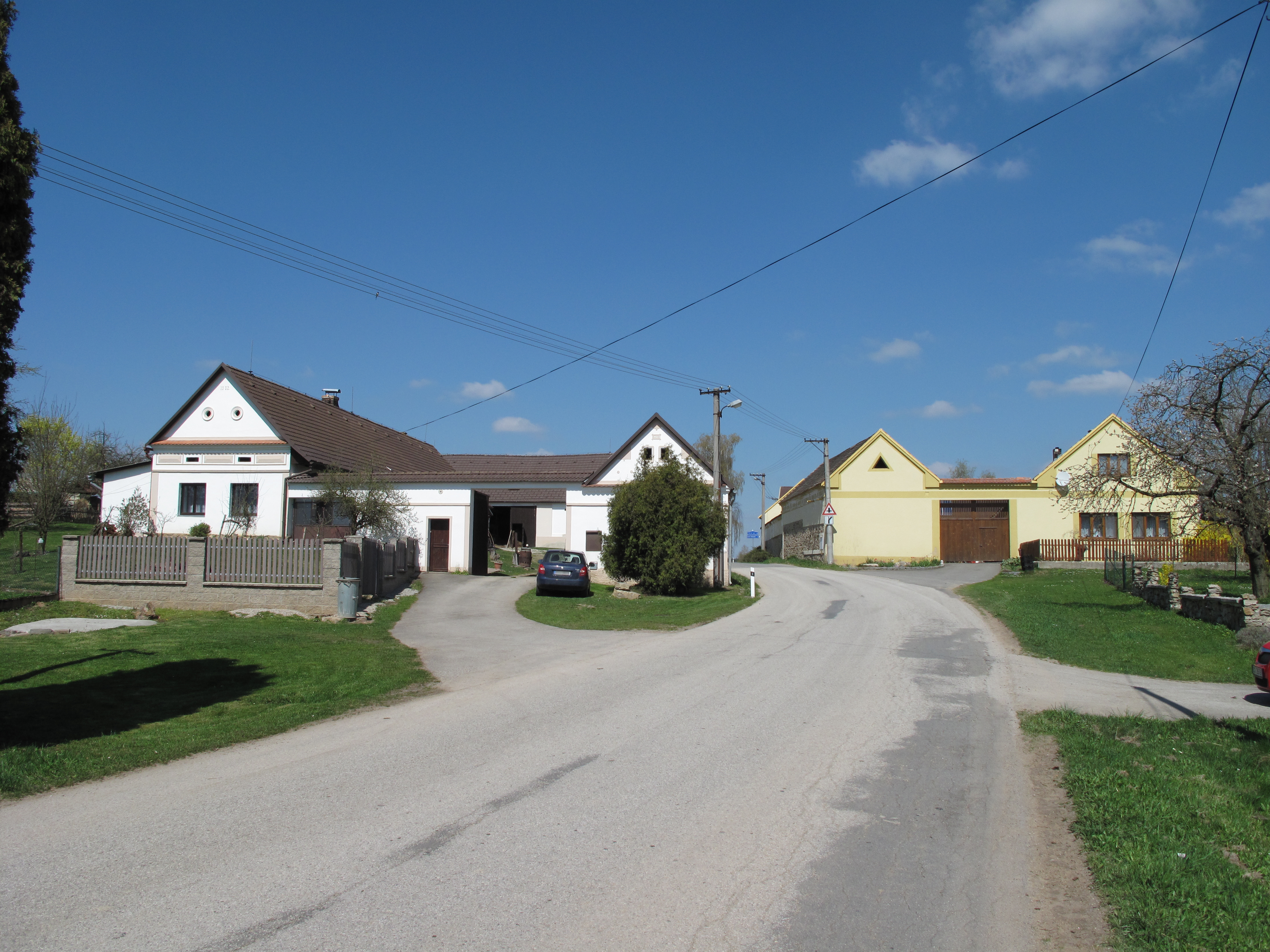 Náves v Radonicích. Okres České Budějovice, Česká republika.